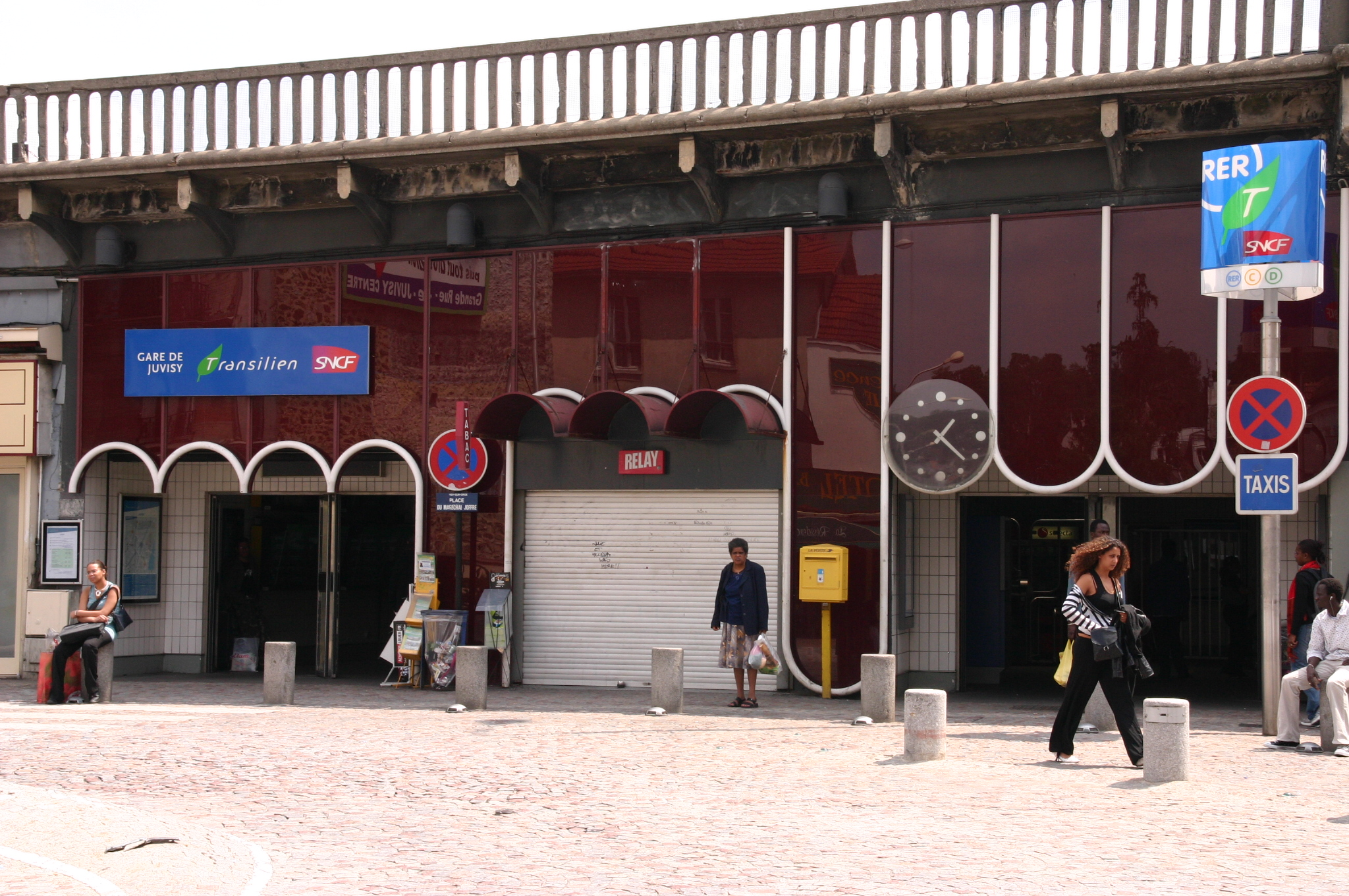 Gare de Juvisy, Juvisy-sur-Orge , département l'Essonne, France